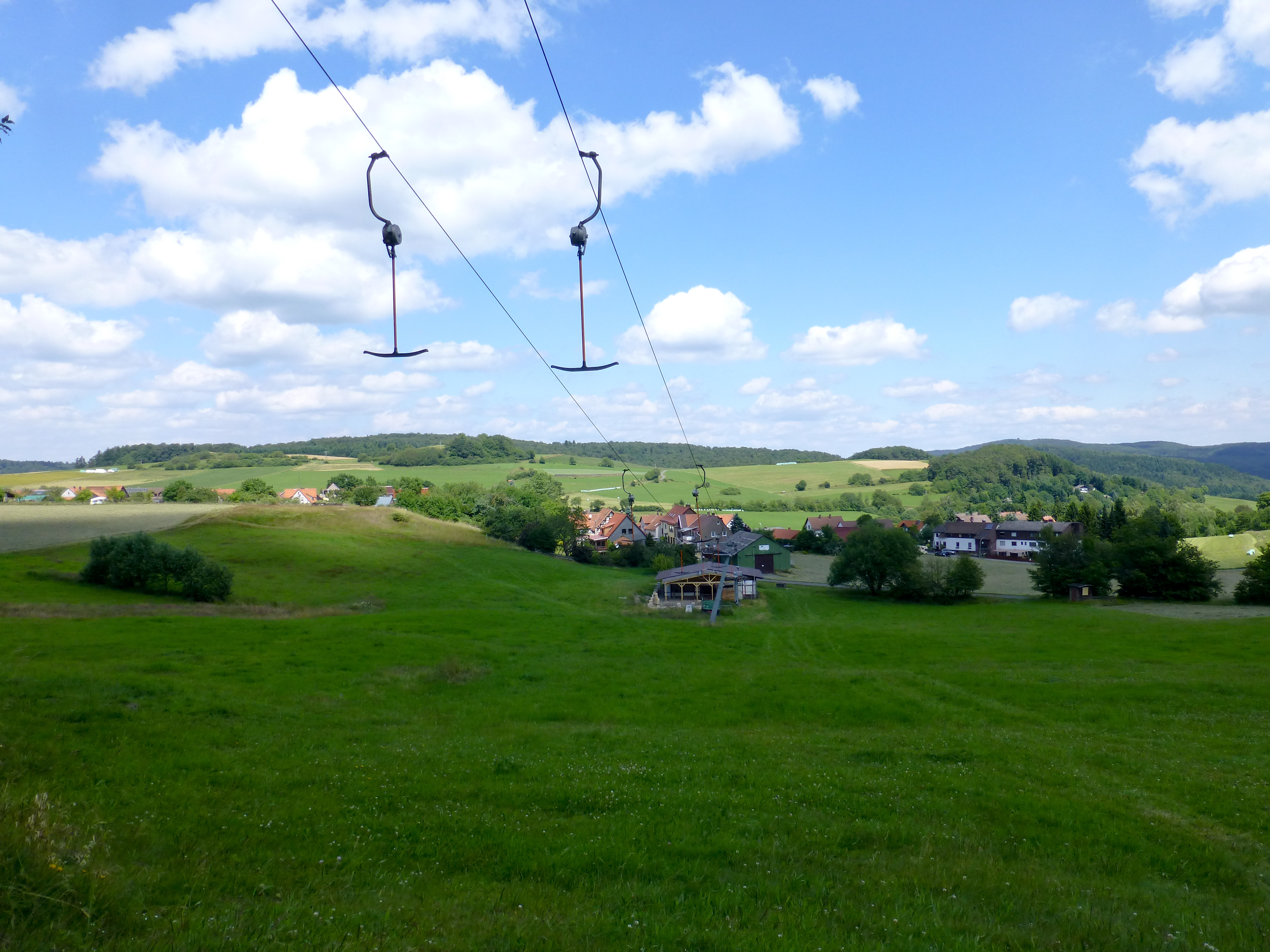 Siklift von Battenhausen im Sommer; Blick vom Studentenpfad am Nordosthang des Hohen Lohrs nordwärts nach Battenhausen